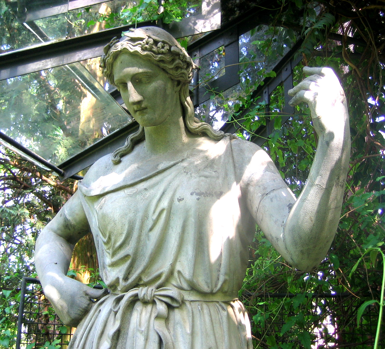 Muse Polyhymnia von Johann Wilhelm Braun, Lapidarium Stuttgart, Stuttgart 1851